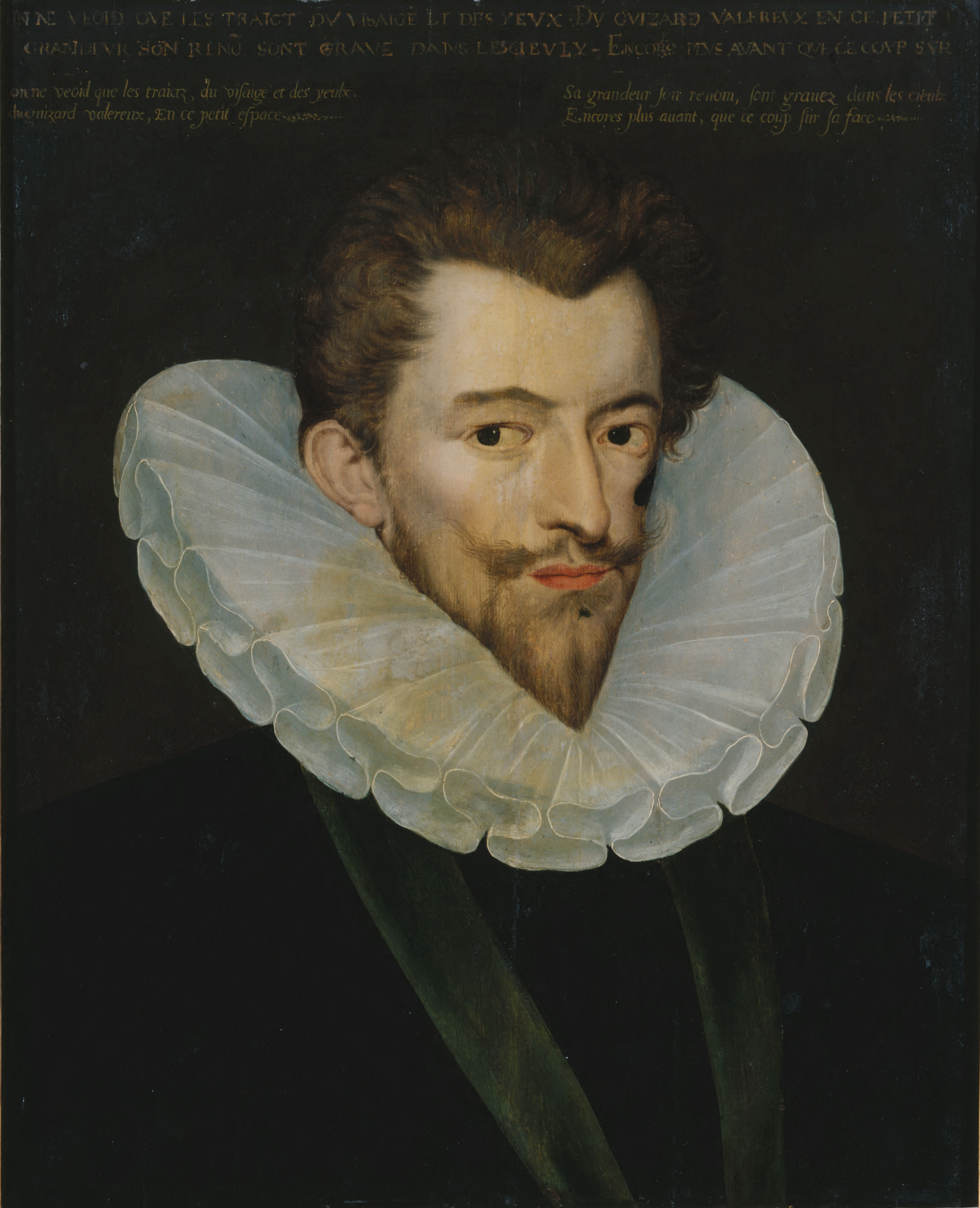 Henri de Lorraine. Henri 1er, 3e duc de Guise, dit le Balafré.